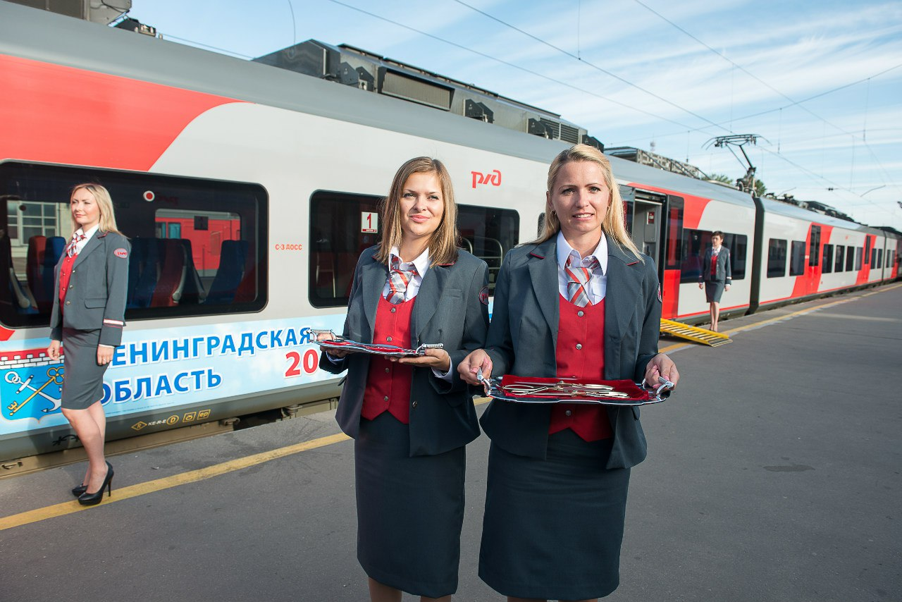 Торжественный запуск электропоезда "Ласточка" по маршруту СПб-Выборг 2 сентября 2015 года.